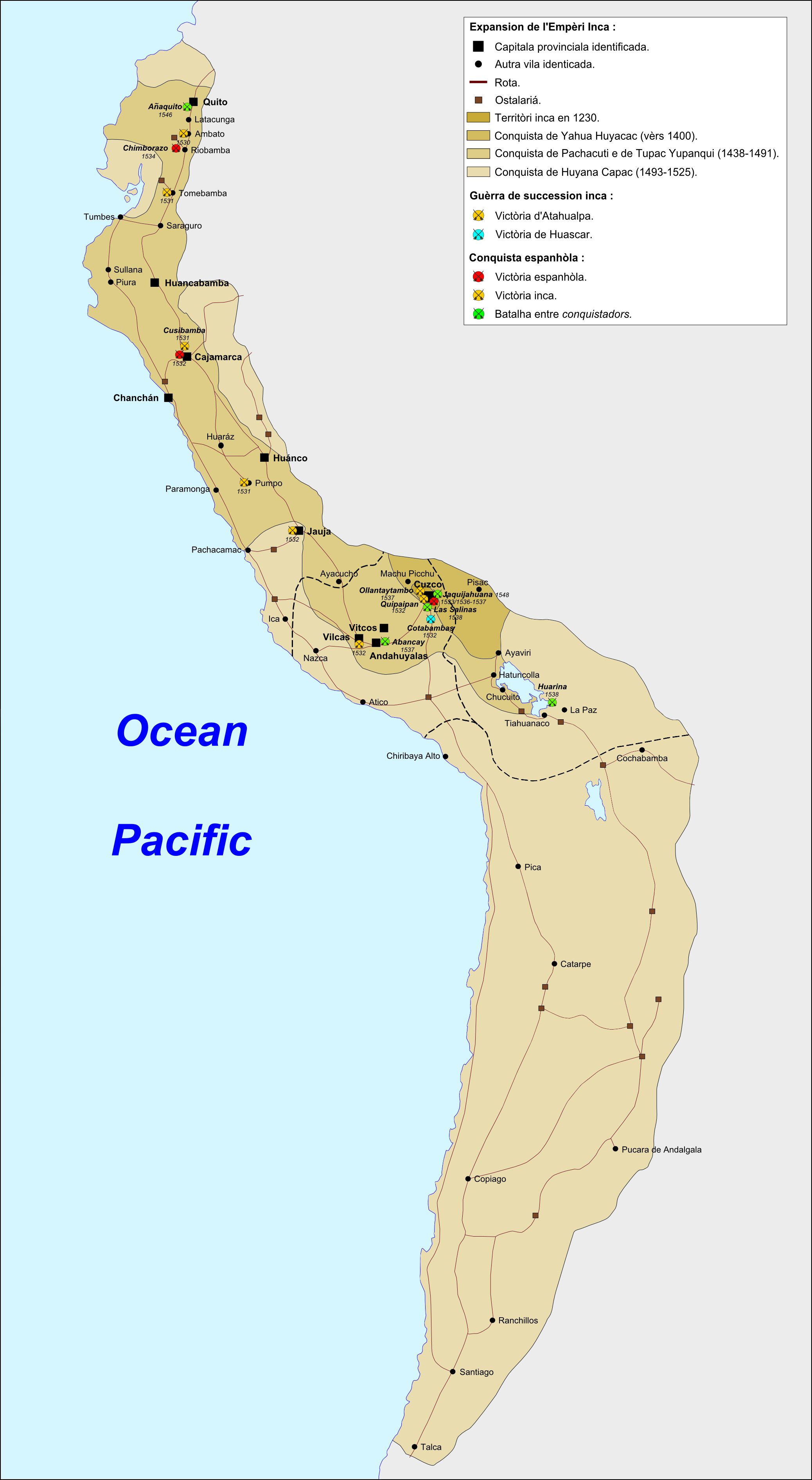 Expansion e afondrament de l'Empèri Inca.